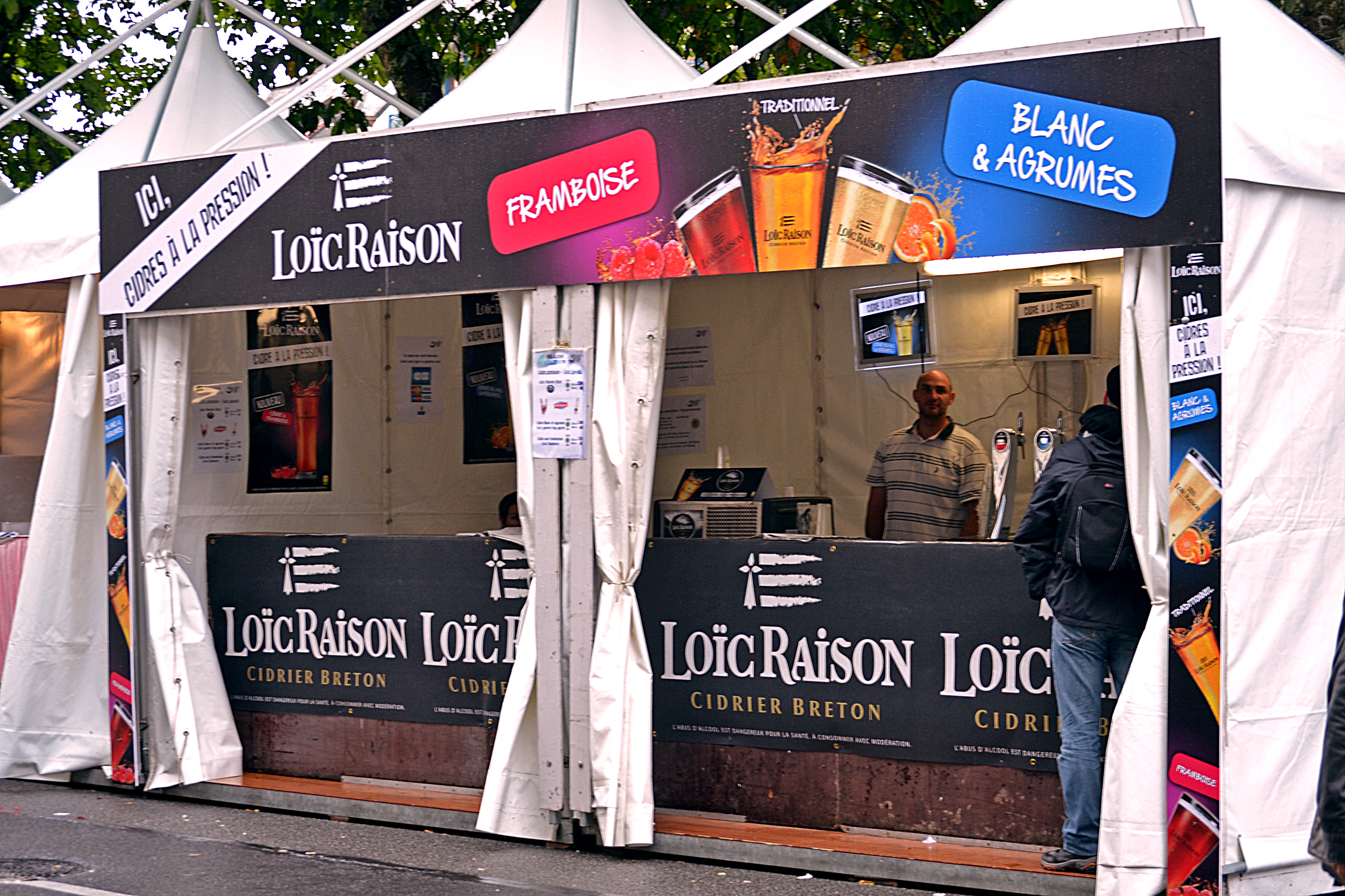 Quais en fête le long de l'Odet et vente de produits bretons lors du festival de Cornouaille 2015 à Quimper (Kemper).